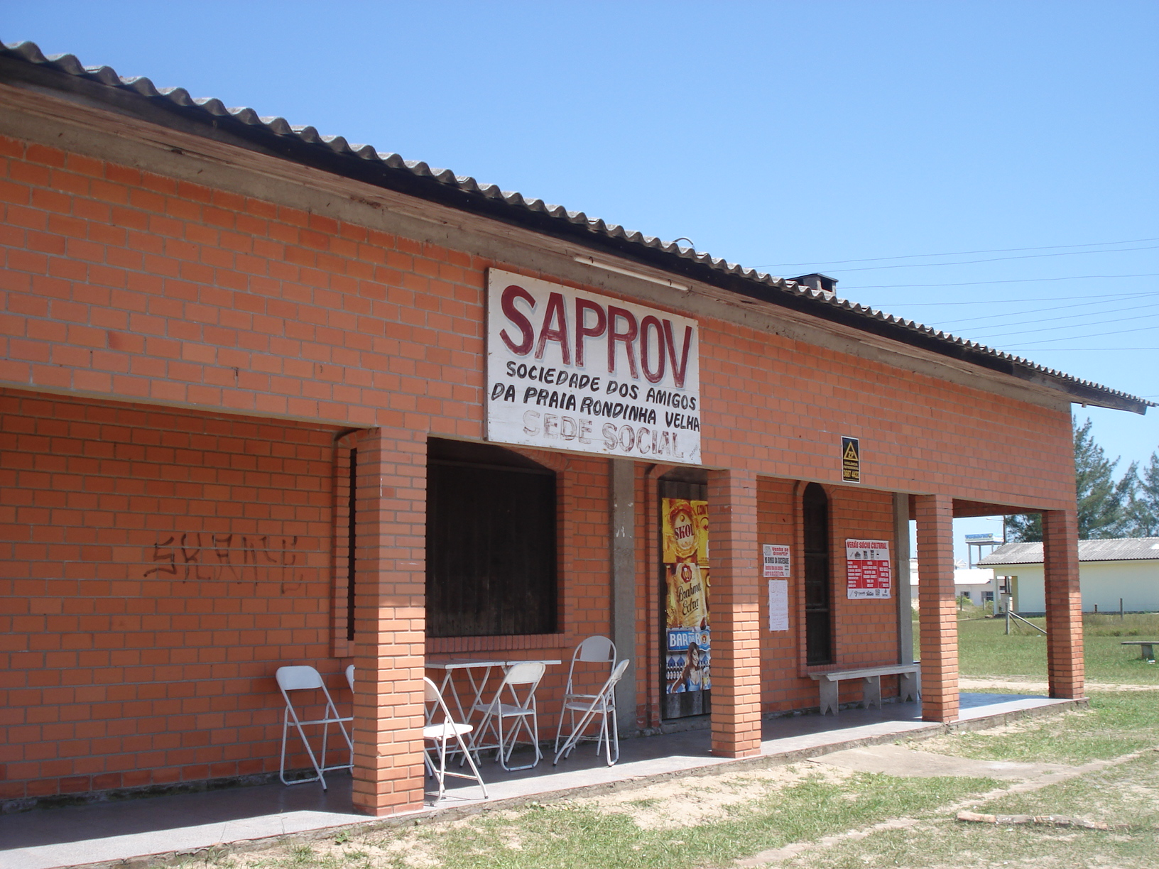 Clube Saprov, na praia de Rondinha Velha, Arroio do Sal